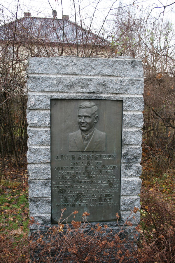 Minnestein over krigshelten Arvid Storsveen (Memorial of WWII hero AS)